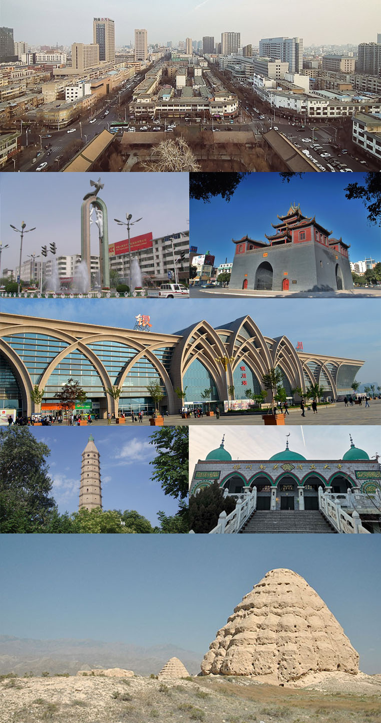 宁夏银川风光蒙太奇：自承天寺塔俯瞰老城区、凤凰碑、钟鼓楼、银川火车站、承天寺塔、南关清真大寺、西夏王陵